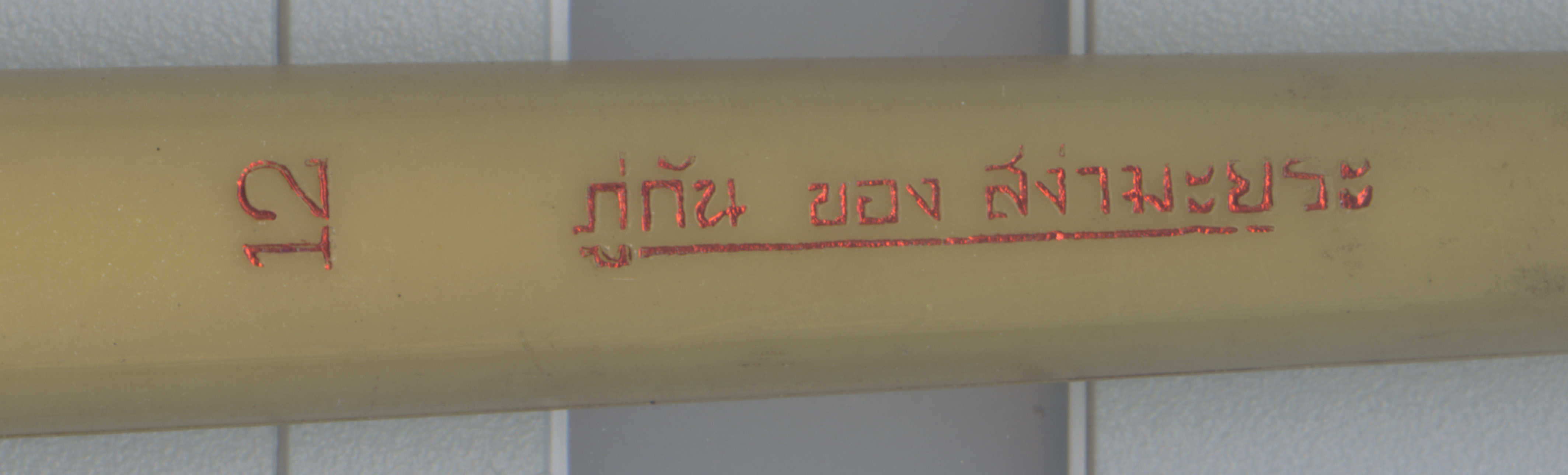 paintbrush by Sa-nga Mayura พู่กันของสง่า มะยุระ